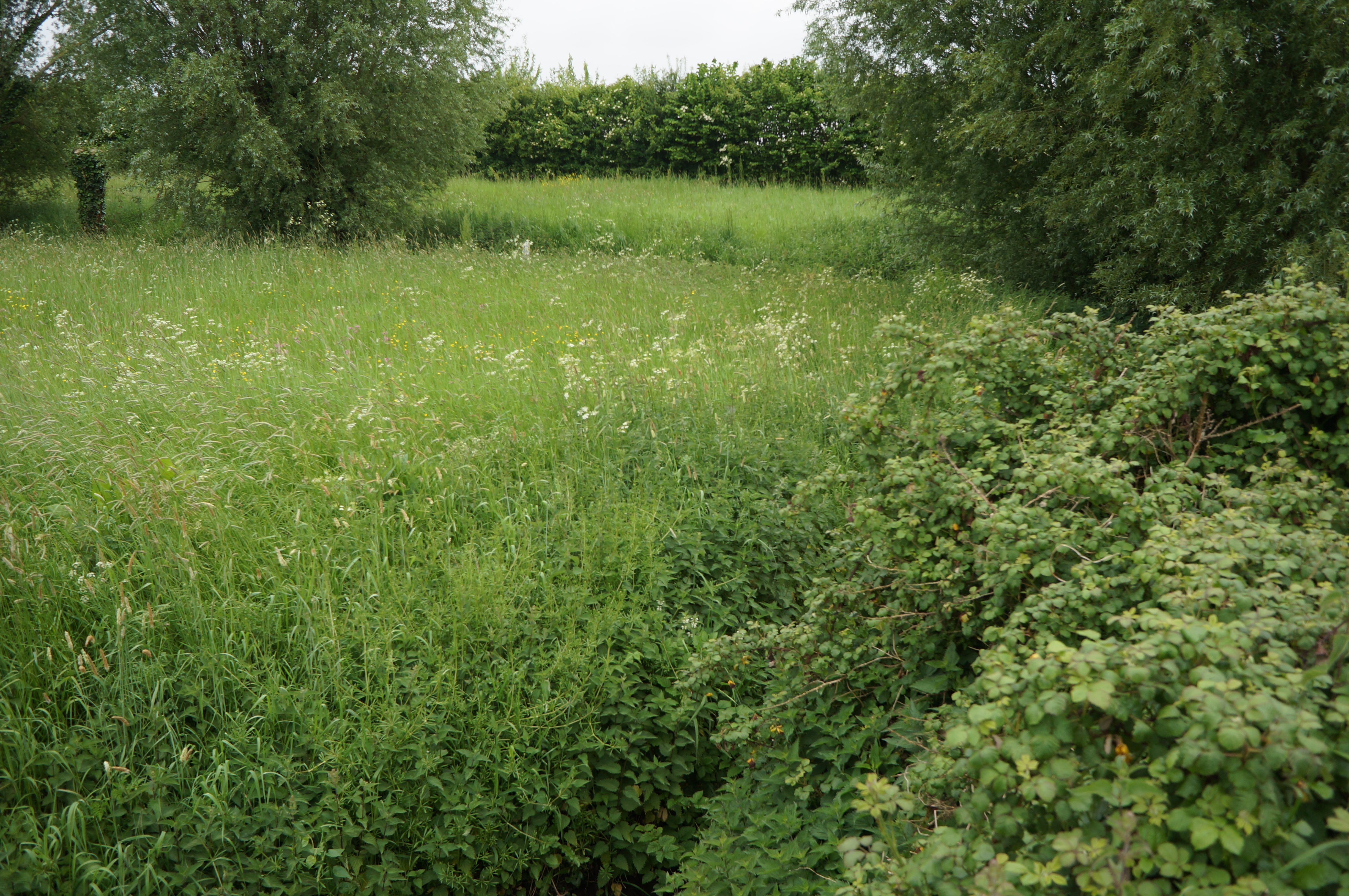 La Réserve naturelle régionale du vallon de la Petite Becque.- Le Circuit des 5 Becques Herzeele.- Nord (département français)